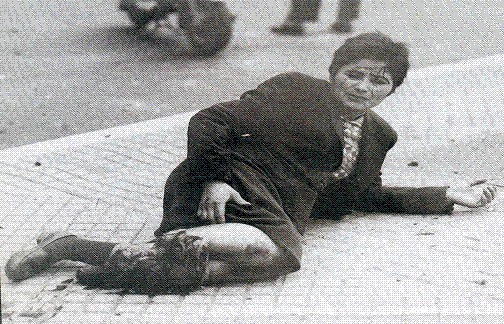 Fotografía de una de las víctimas del bombardeo de Plaza de Mayo de Buenos Aires del 16-6-55 herida en el suelo.